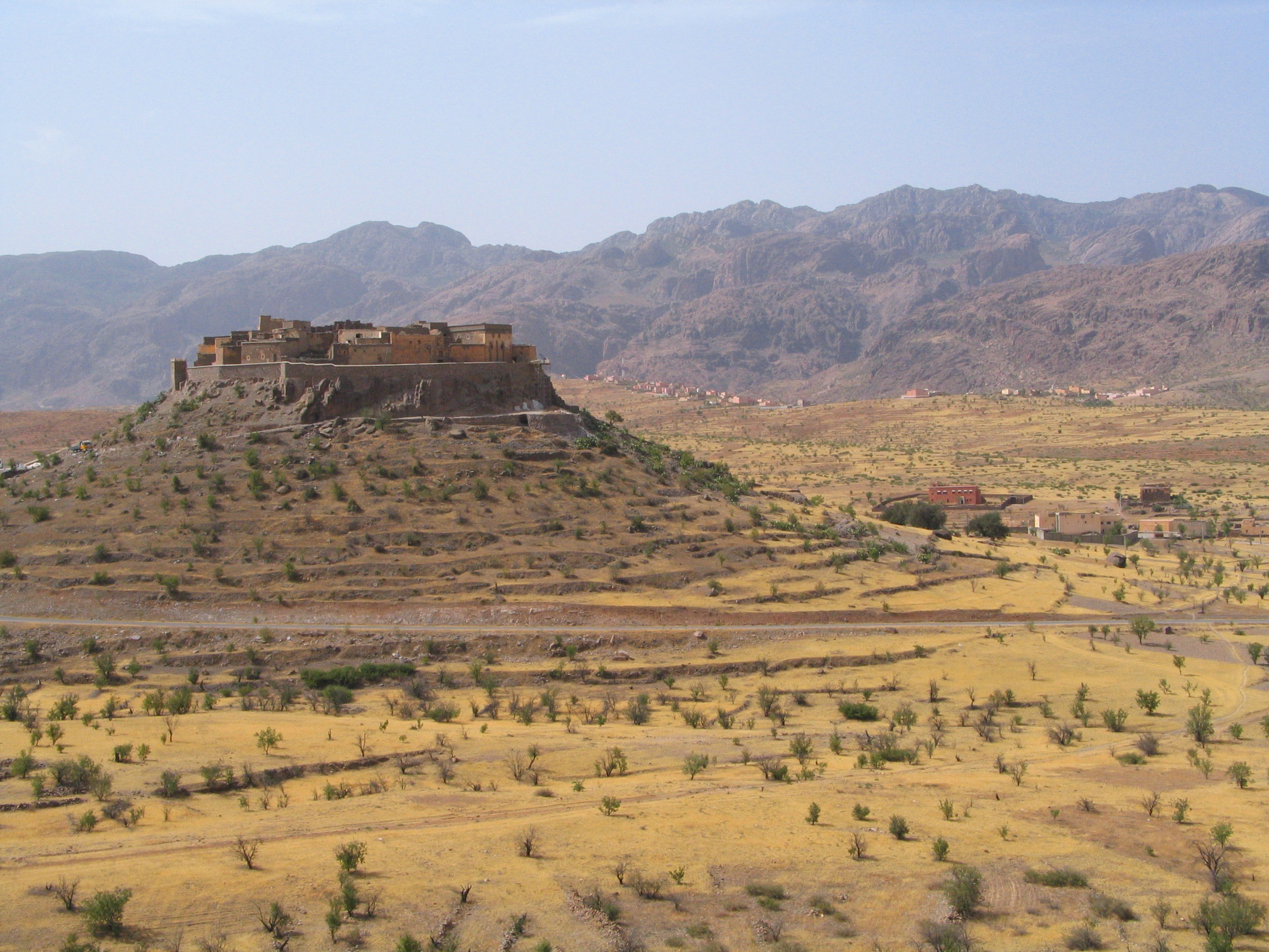 Village chleuh de Tioulit, route de Tafraout, région d'Agadir, Anti-Atlas, Maroc